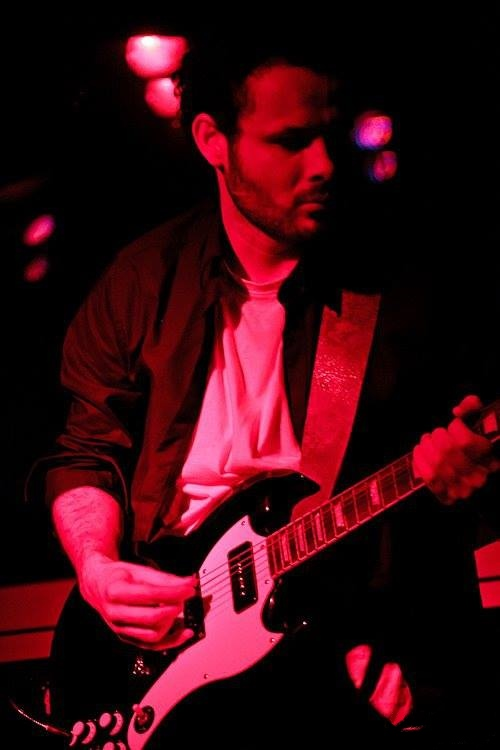 Joel Fausto, Maus Hábitos 2012 (Porto)